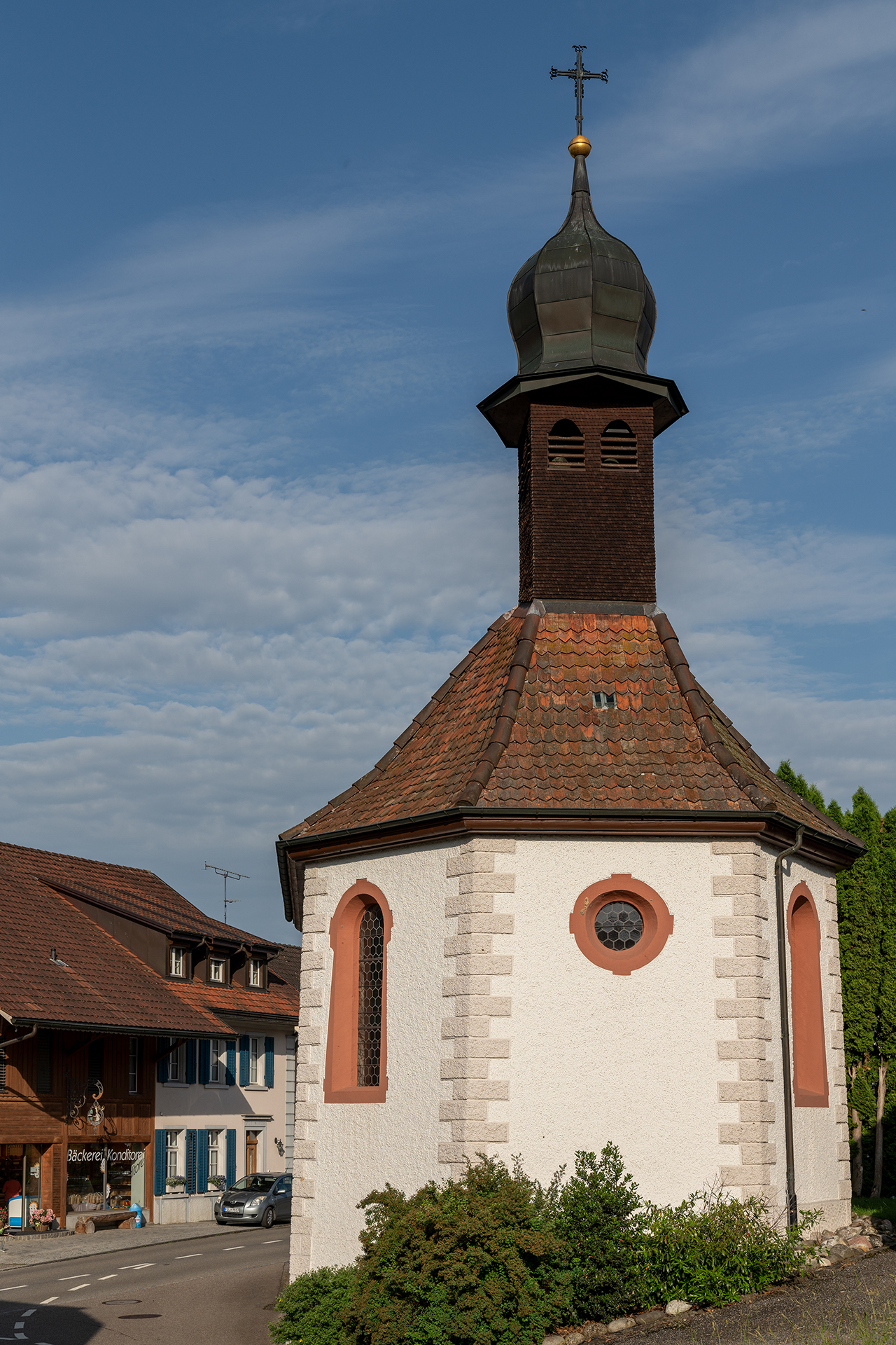 St. Wendelinskapelle in Wil (AG)